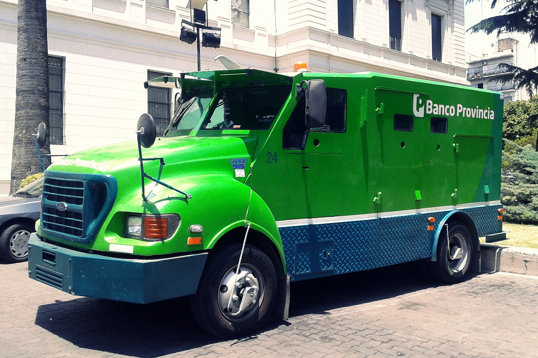 Camion de caudales BAPRO